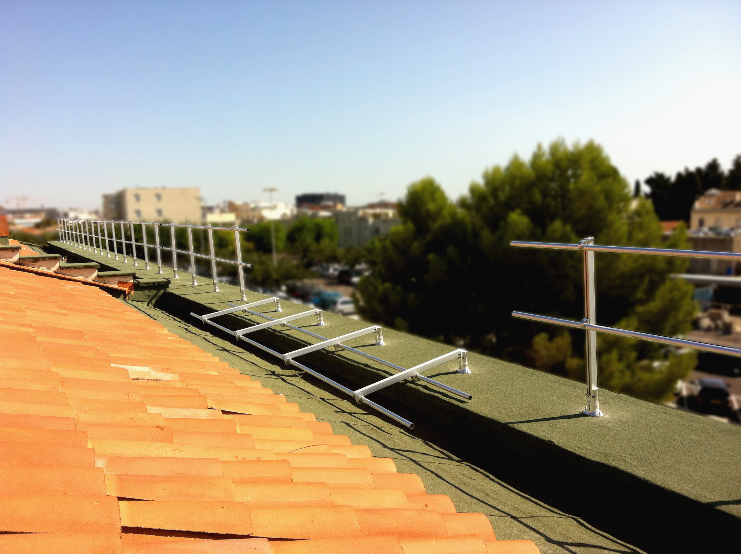 Garde-corps en aluminium rabattable acbi pour toitures terrasses inaccessibles au public (NF E85-015).